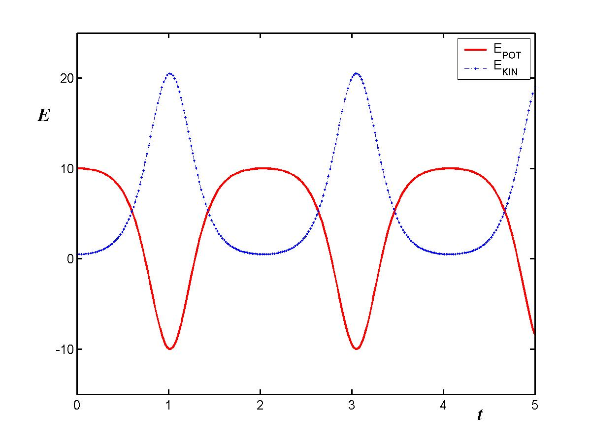 Математический маятник, пример потенциальной и кинетической энергии.